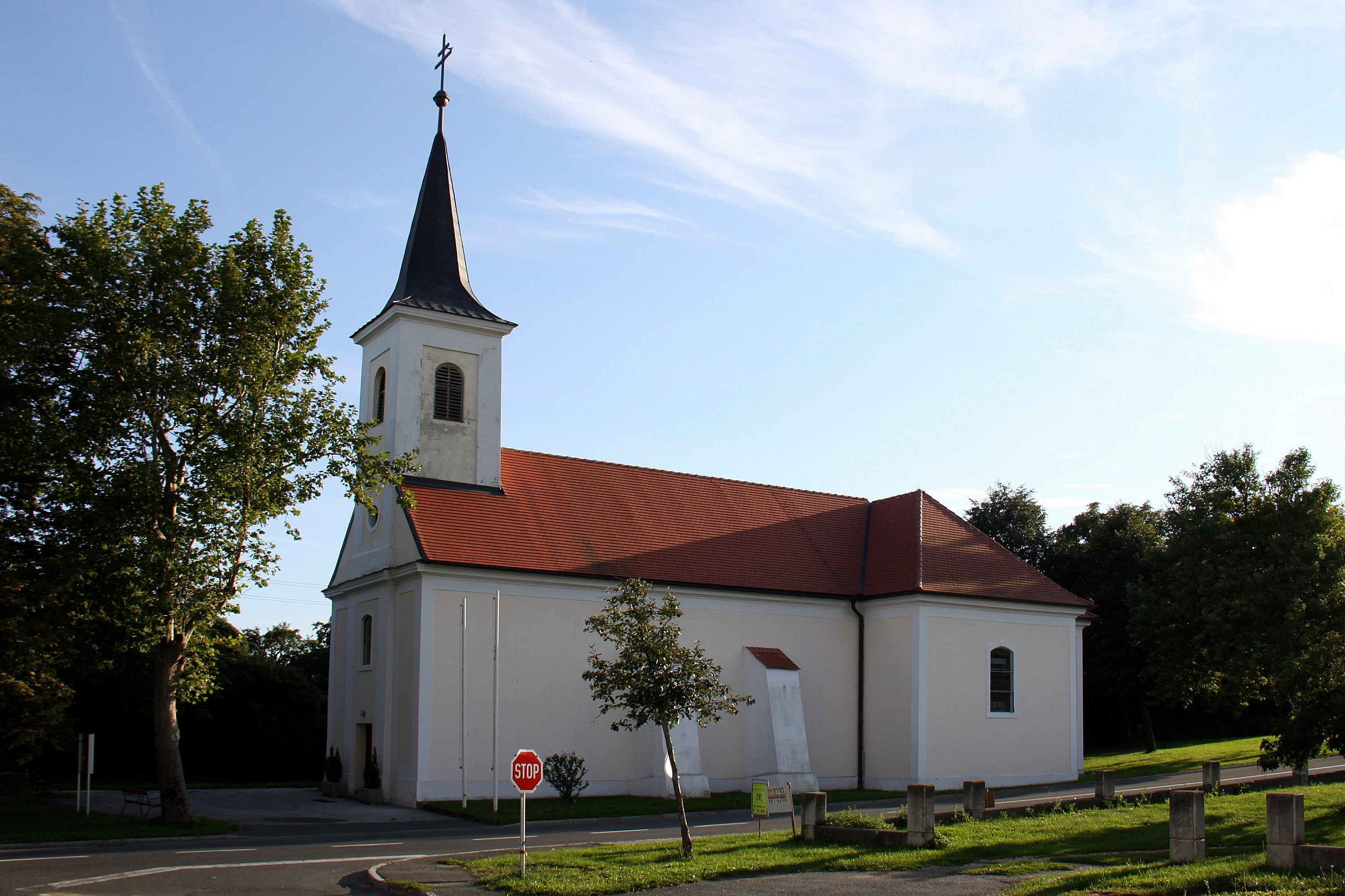 Weiden bei Rechnitz - Pfarrkirche hl. Johannes Nepomuk Object location47° 18′ 08.78″ N, 16° 20′ 41.68″ E